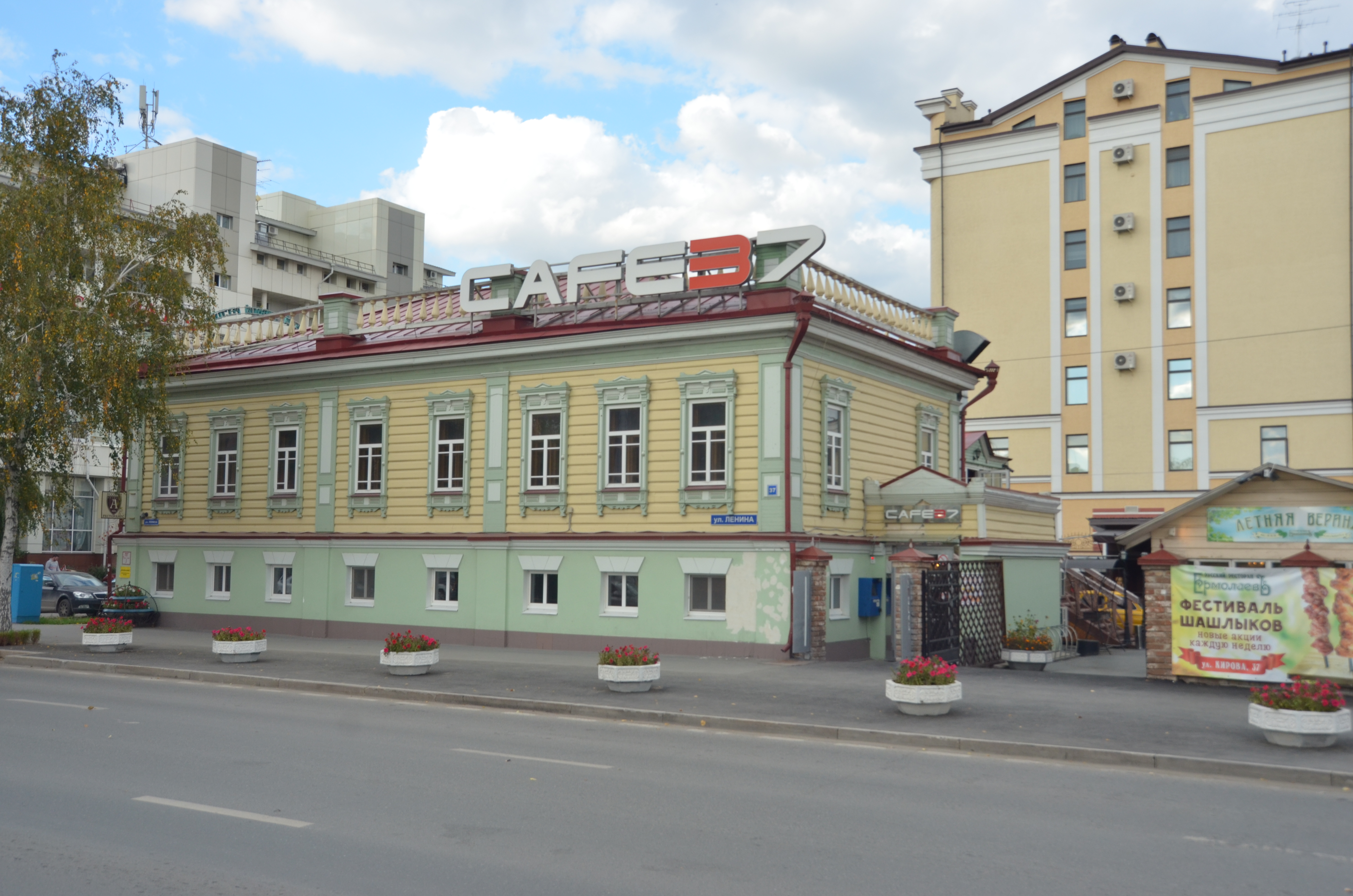 Дом жилой: улица Кирова, 37 / улица Ленина, 37, Тюмень, Тюменская область